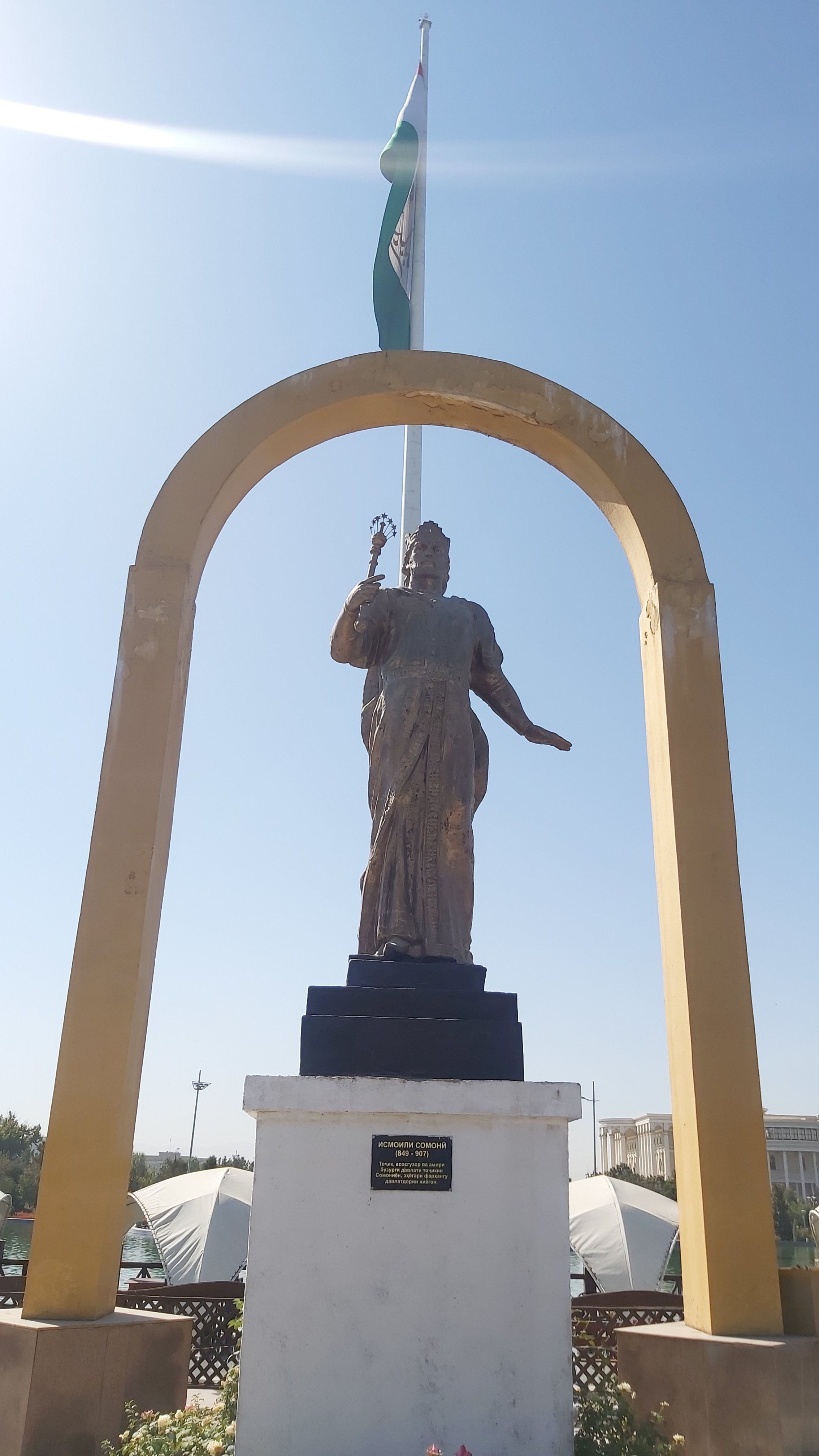 Исмаил Сомони в парке Нацфлага